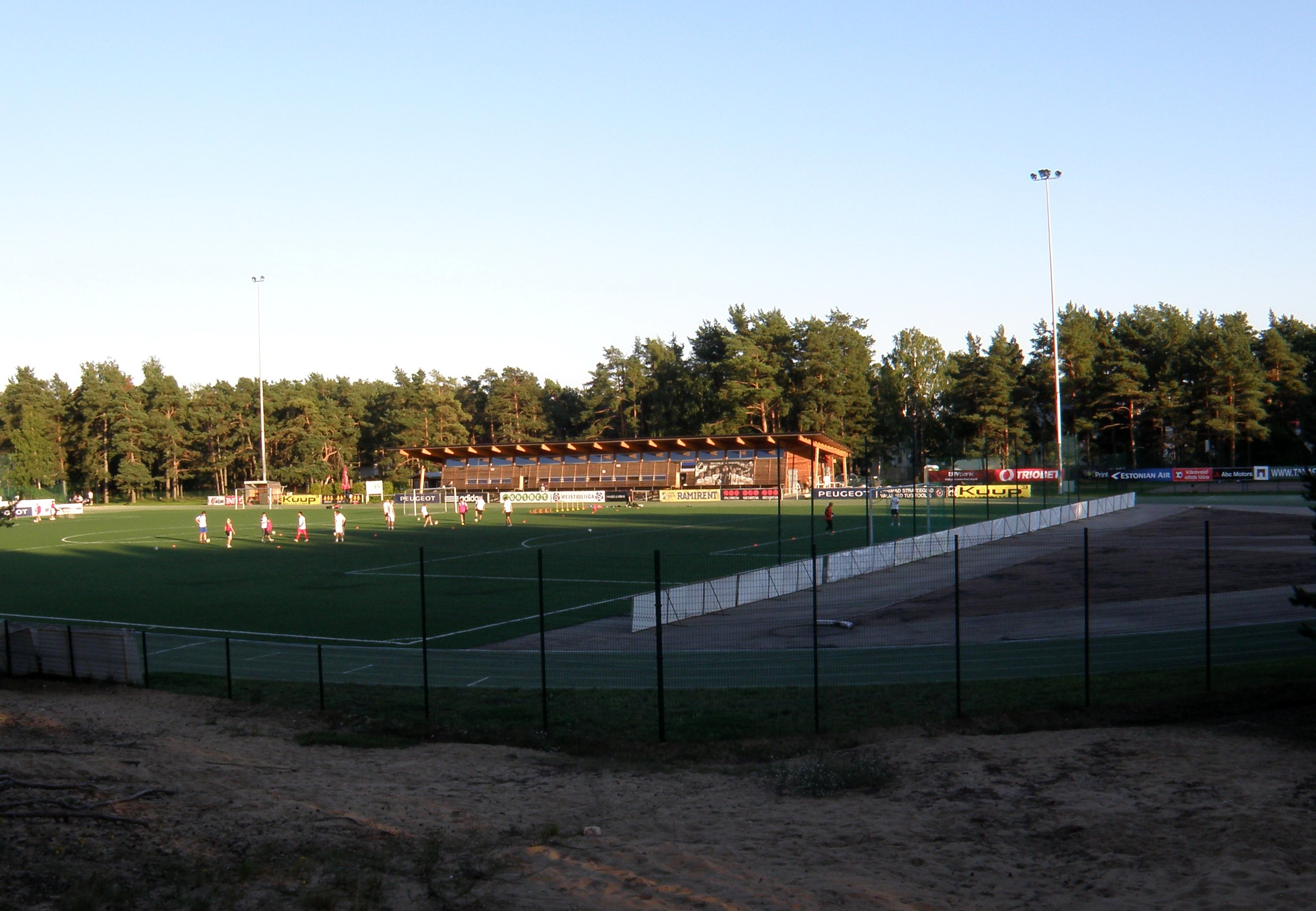 Hiiu staadion